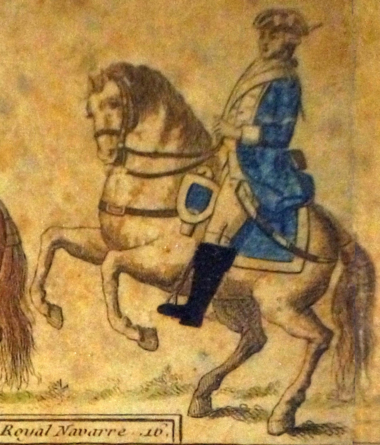 Présenté au Musée de l'Armée.